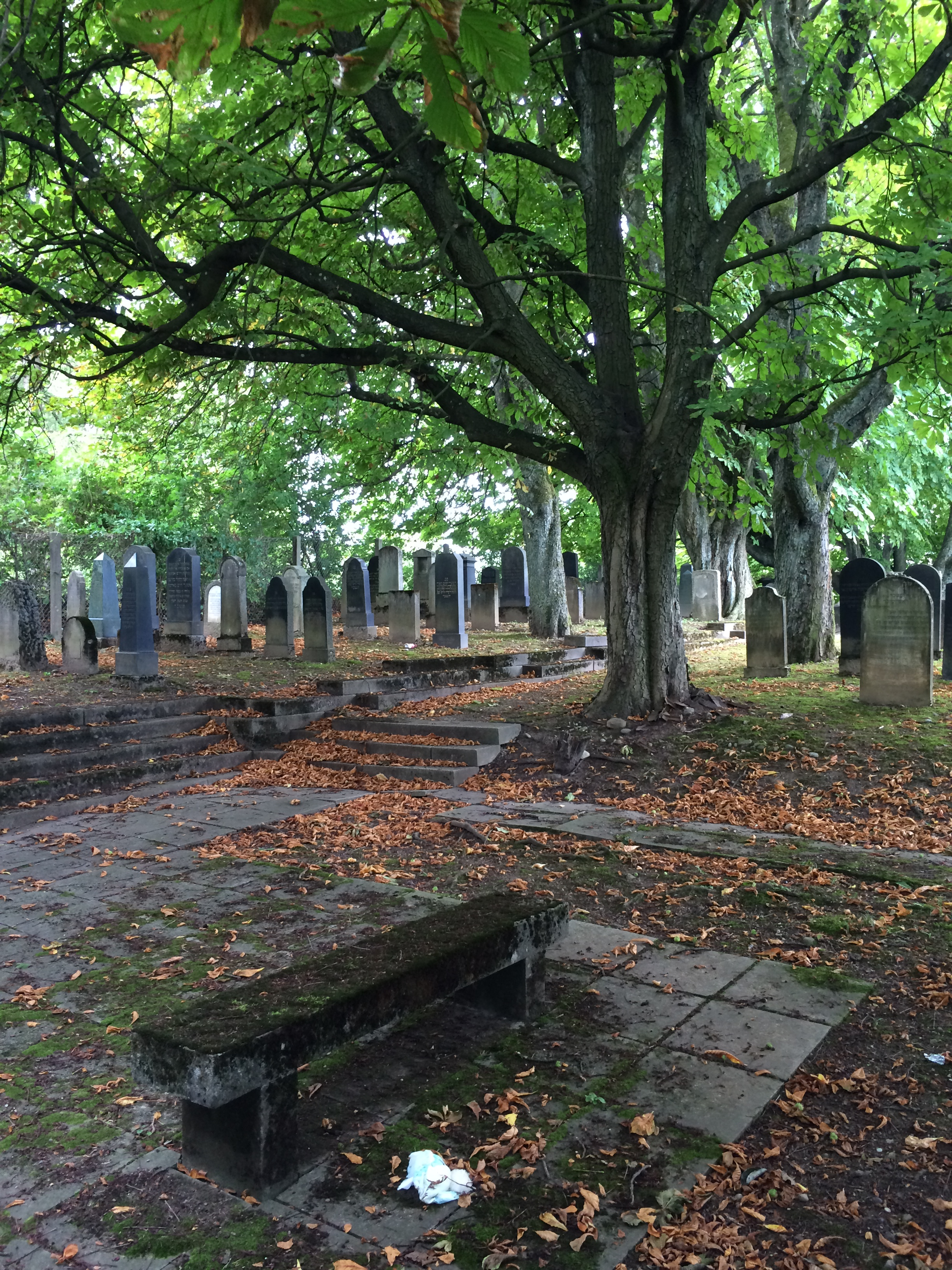 Jüdischer Friedhof Steinkluppe, Zürich